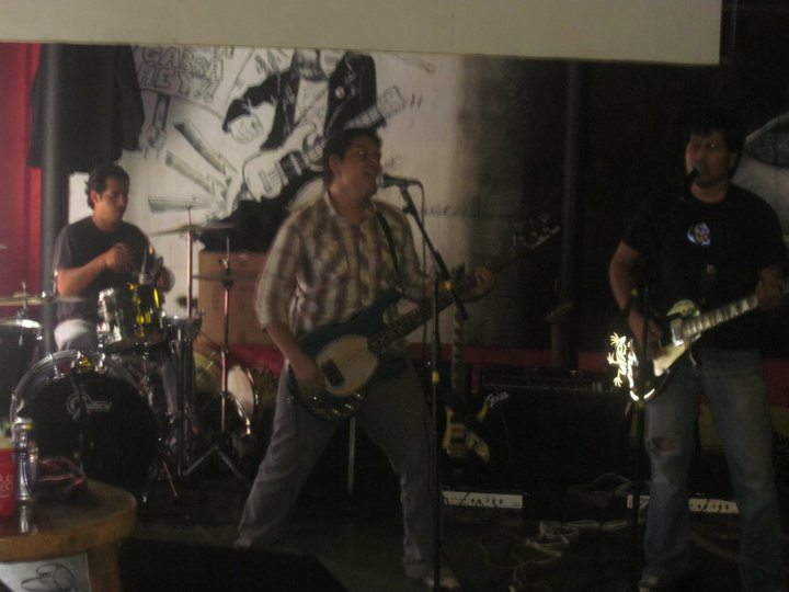 Emerson Ortiz (batería), Luis Garcia (bajo), y Alfredo Garcia (Guitarra, voz)